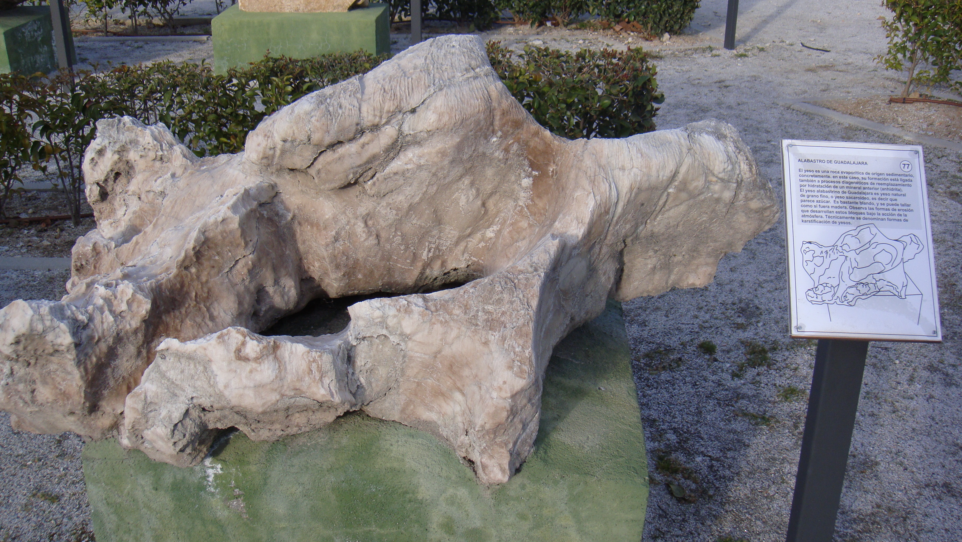 Parque museo ciclopeo alabastro2